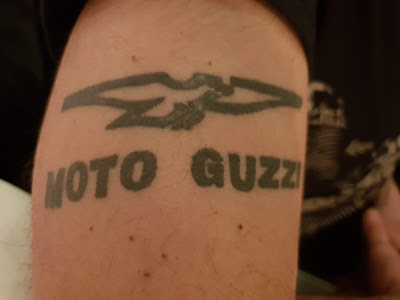 Moto Guzzi Emblem auf Oberarm